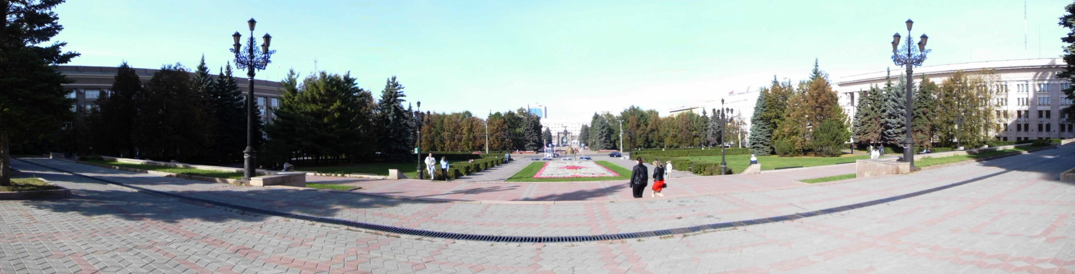 Площадь Революции в городе Челябинске, вид с южной части от здания драмтеатра. Панорамный снимок. Справа - здание администрации города (пл. Революции, 2), слева - здание «Челябэнерго» (пл. Революции, 5), посередине на дальнем плане - памятник Ленину и центральная часть здания, пр-т Ленина, 54.